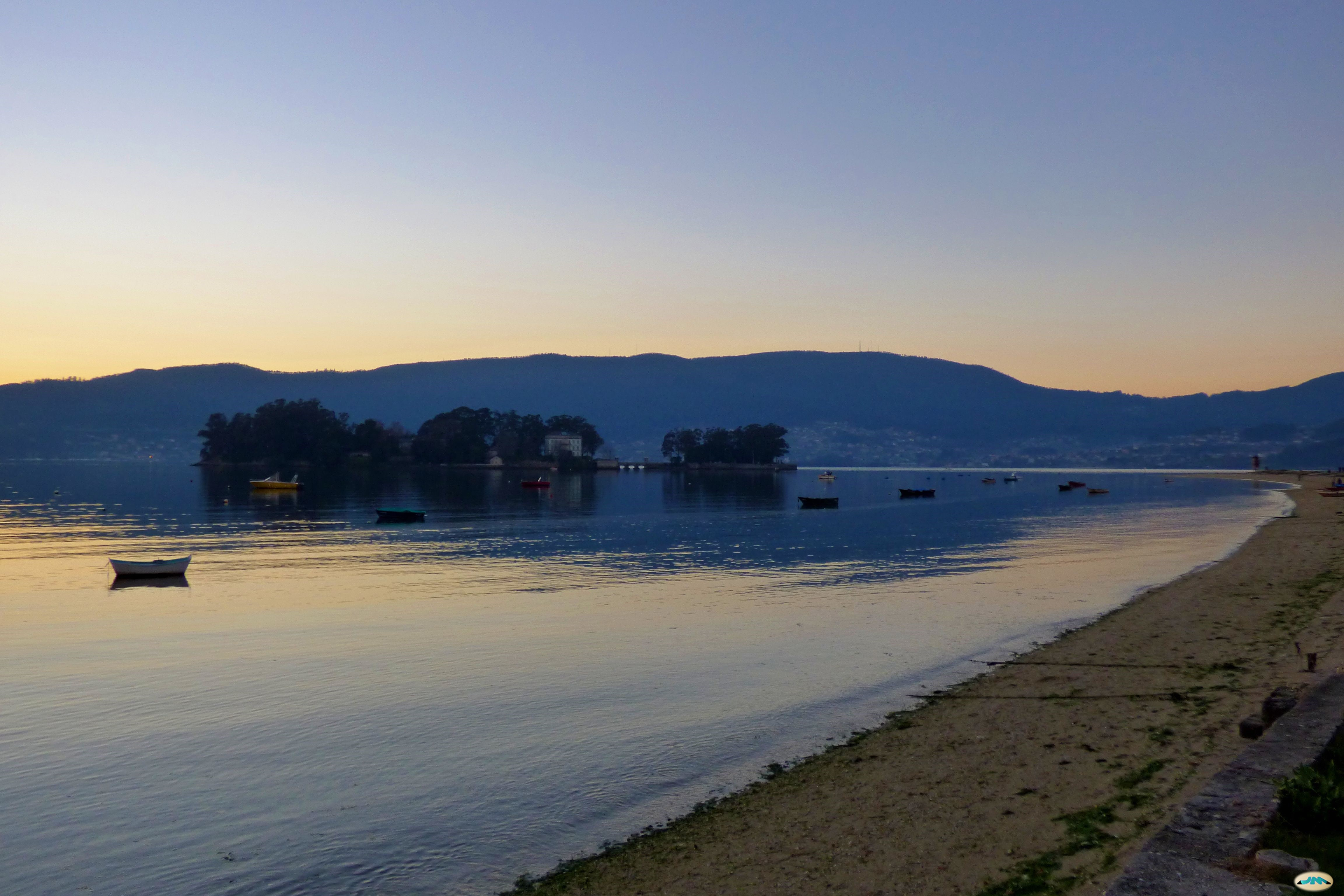 Islas de San Simón y San Antón